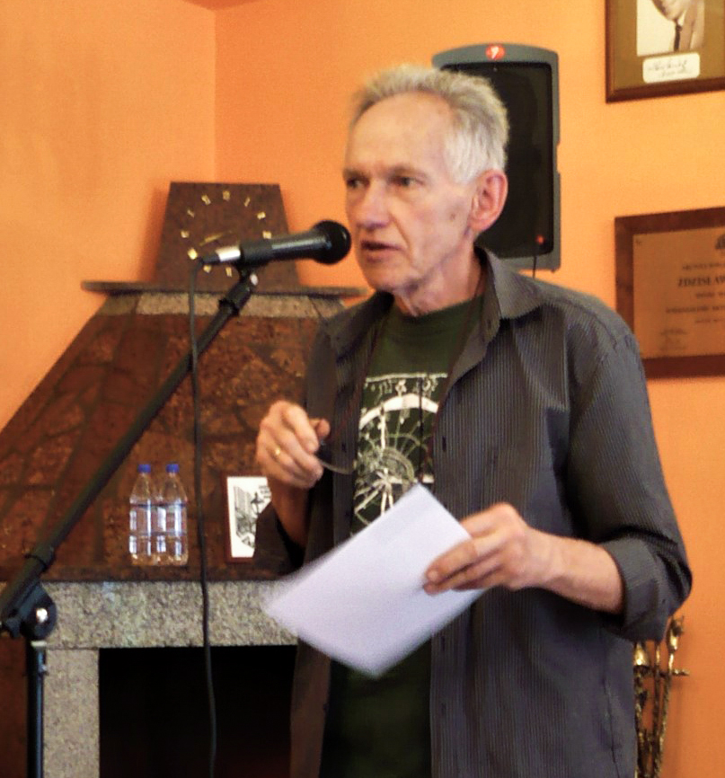 Pisarz Antoni Matuszkiewicz w Nowej Rudzie.